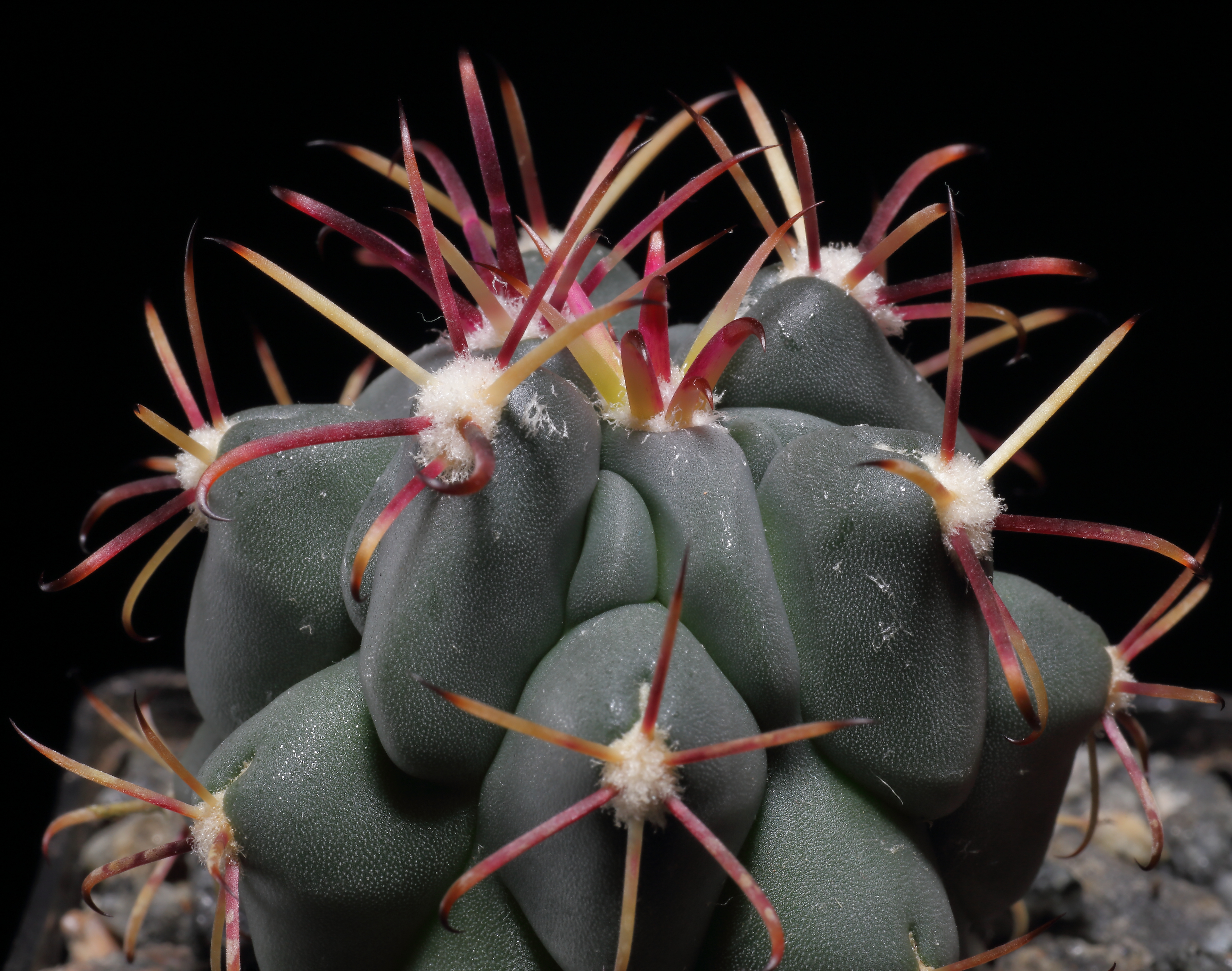 Sclerocactus uncinatus ssp. crassihamatus